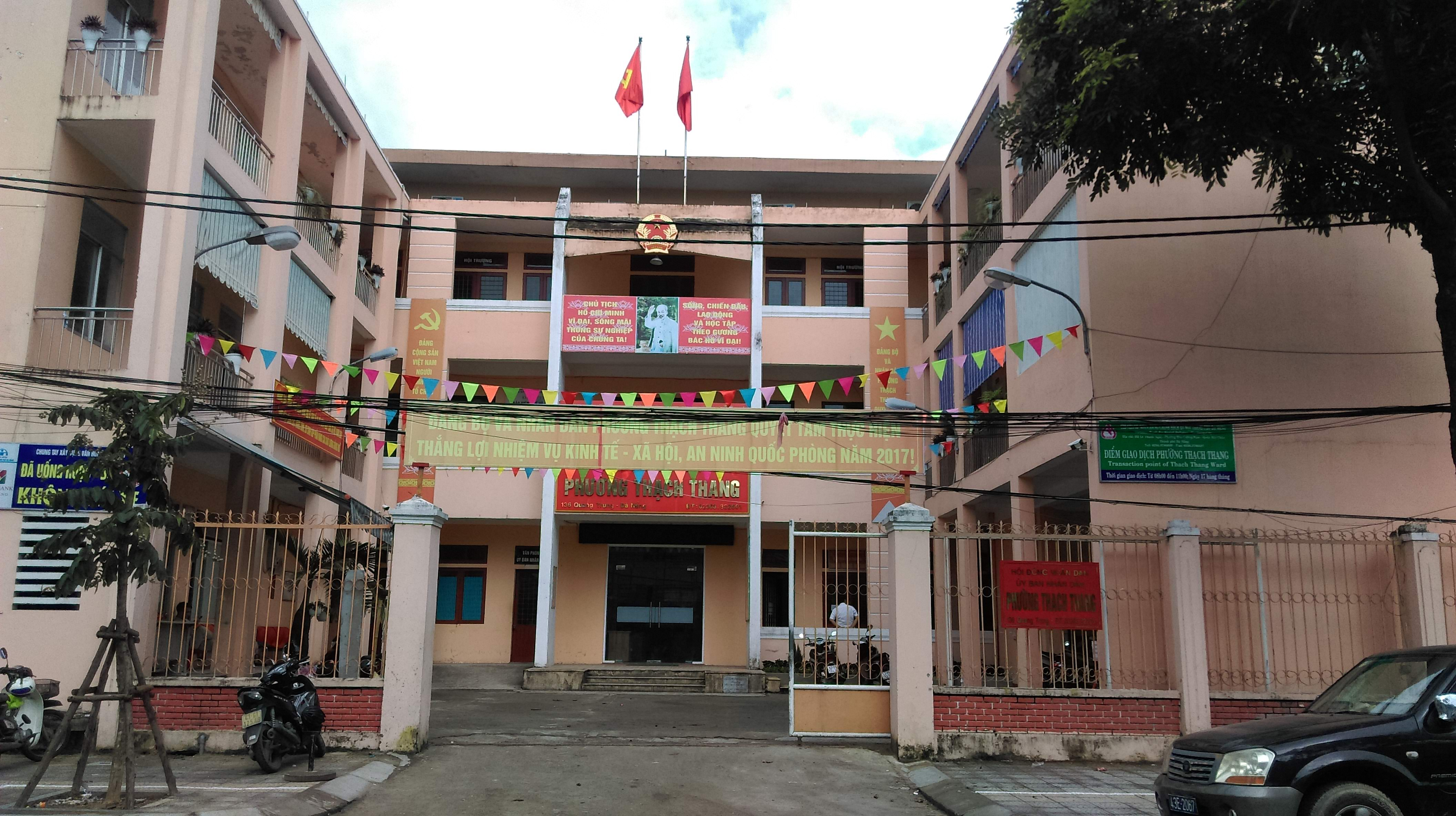 UBND phường Thạch Thang, Hải Châu, Đà Nẵng